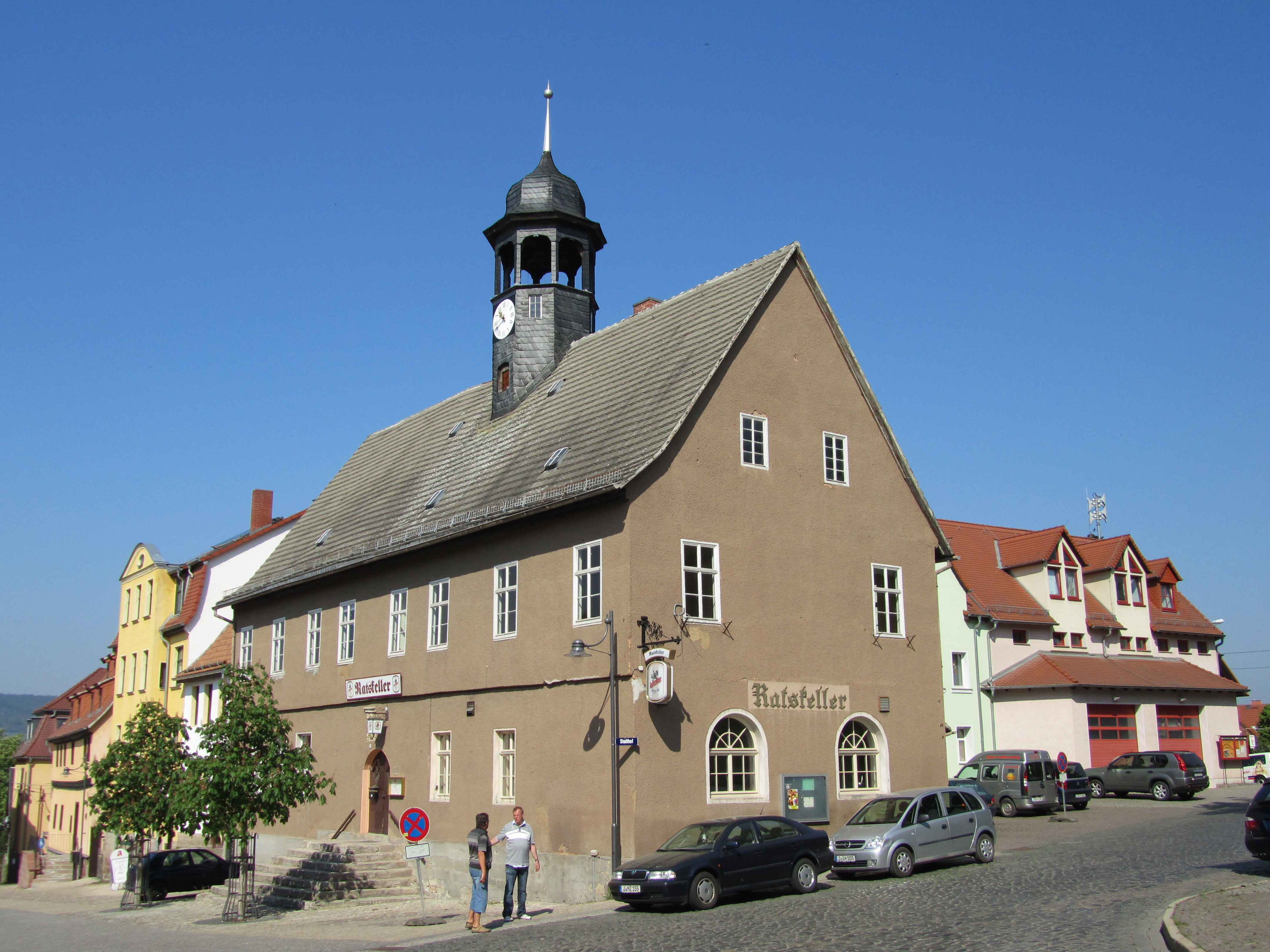 Das Rathaus von Jena-Lobeda (Thüringen).